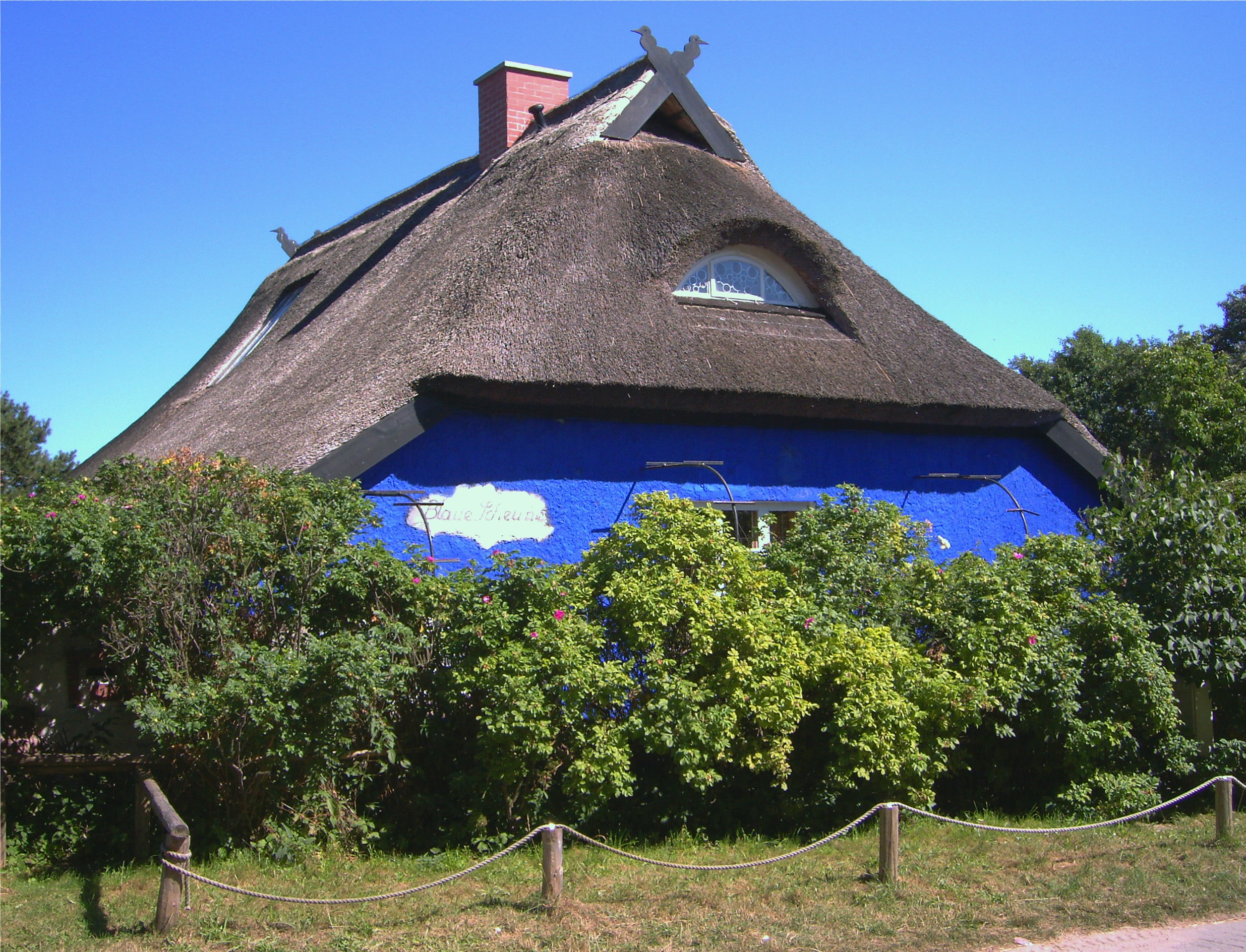 Blaue Scheune Hiddensee 2006